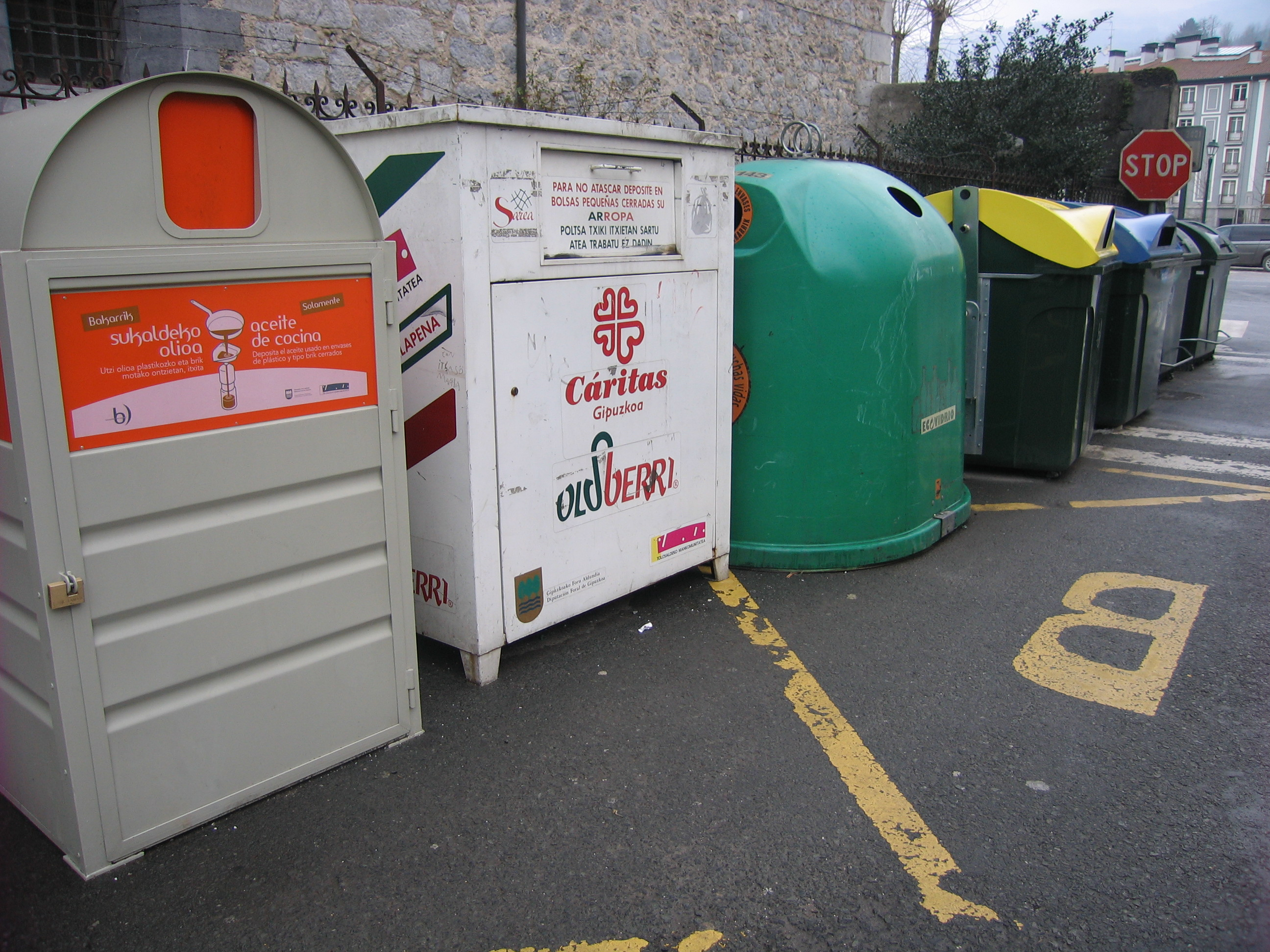 Gai birziklagarrientzako edukiontziak. Tolosa.